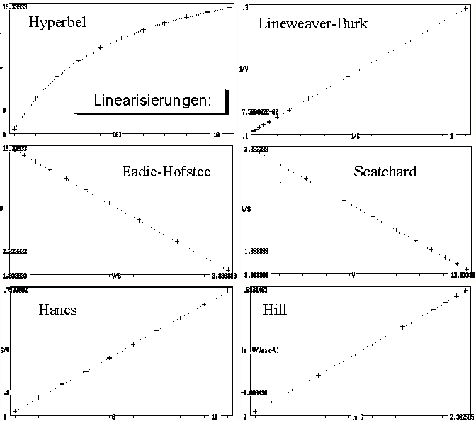 Enzymkinetik. Diagramme: Lineweaver-Burk-Diagramm, Eadie-Hofstee-Diagramm, Scatchard-Diagramm, Hanes-Diagramm, Hill-Diagramm